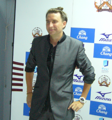 Mika Lönnström